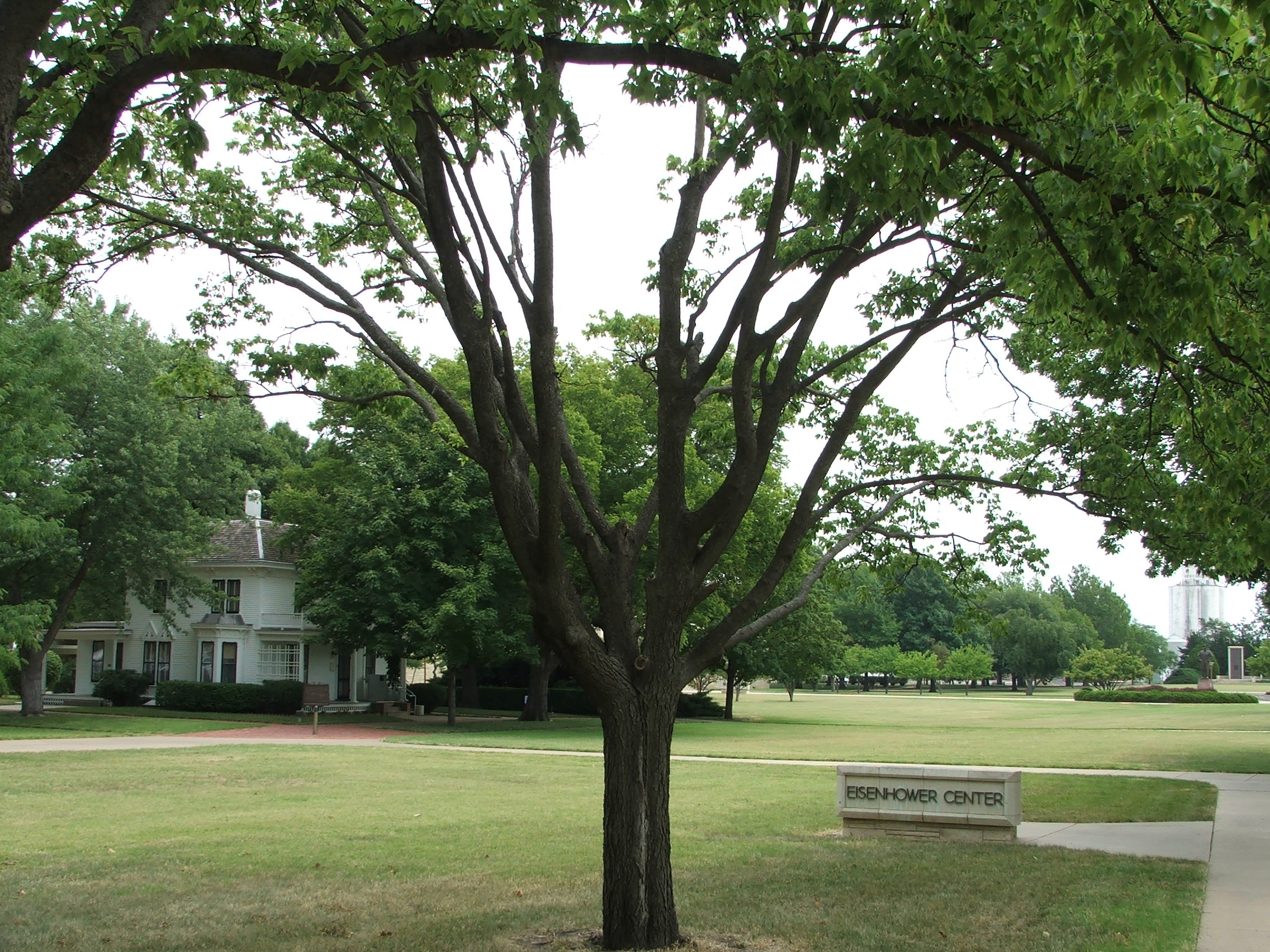 Eisenhower Center grounds, Abilene, Kansas, USA